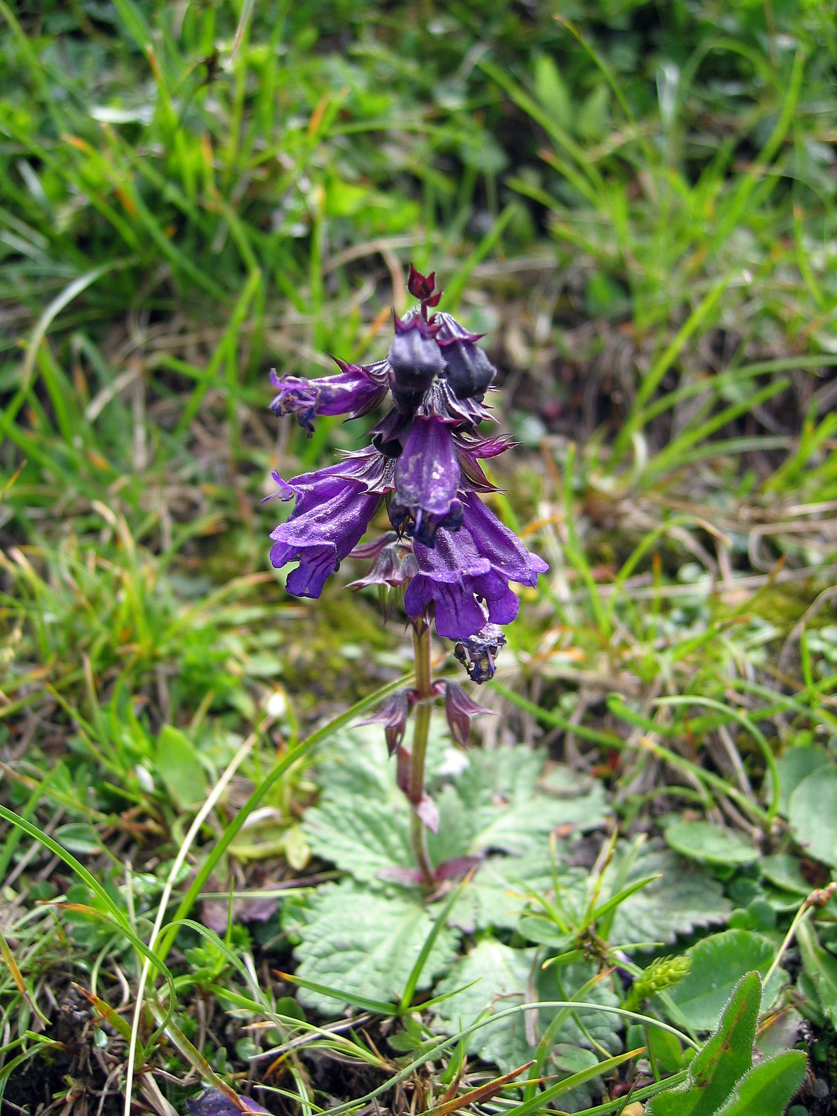 Horminum pyrenaicum, Near Neue Porze Hütte, Karnische Alpen, Tyrol, Austria